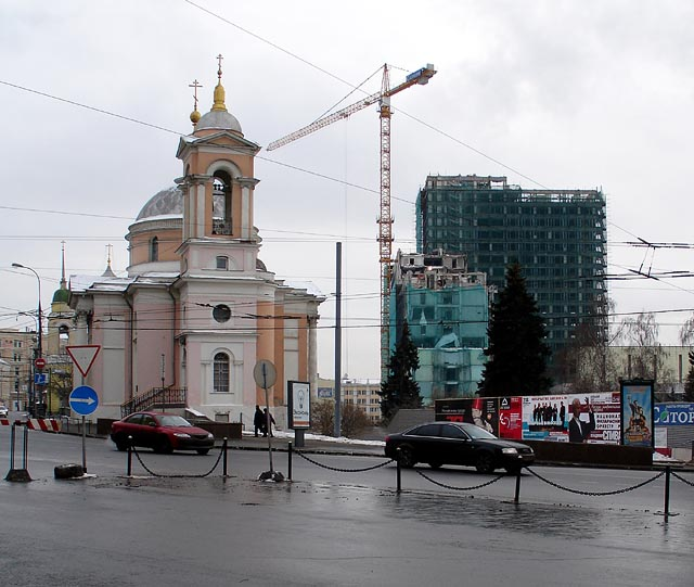 Hotel Rossiya demolition